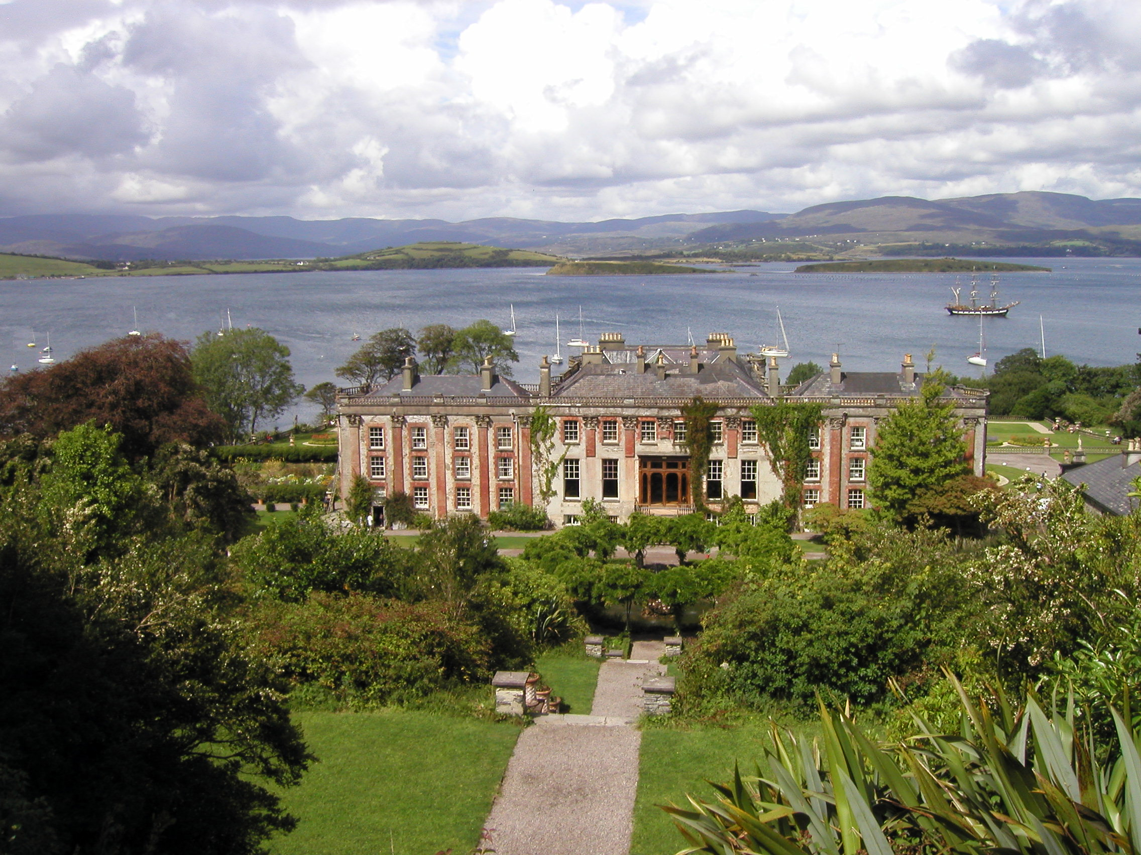 Blick auf Bantry House und Bantry Bay, County Cork, Irland